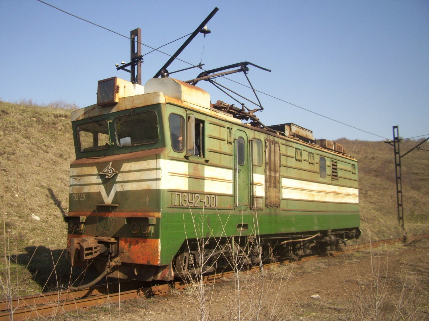 Секция электровоза ПЭУ2-001 в Текели, Казахстан